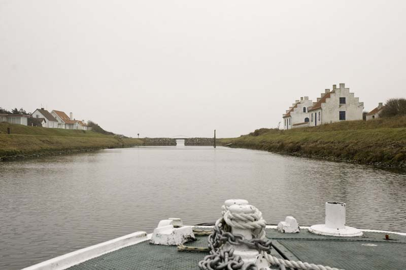 Frederik VII canal, southern part, Løgstør, Denmark